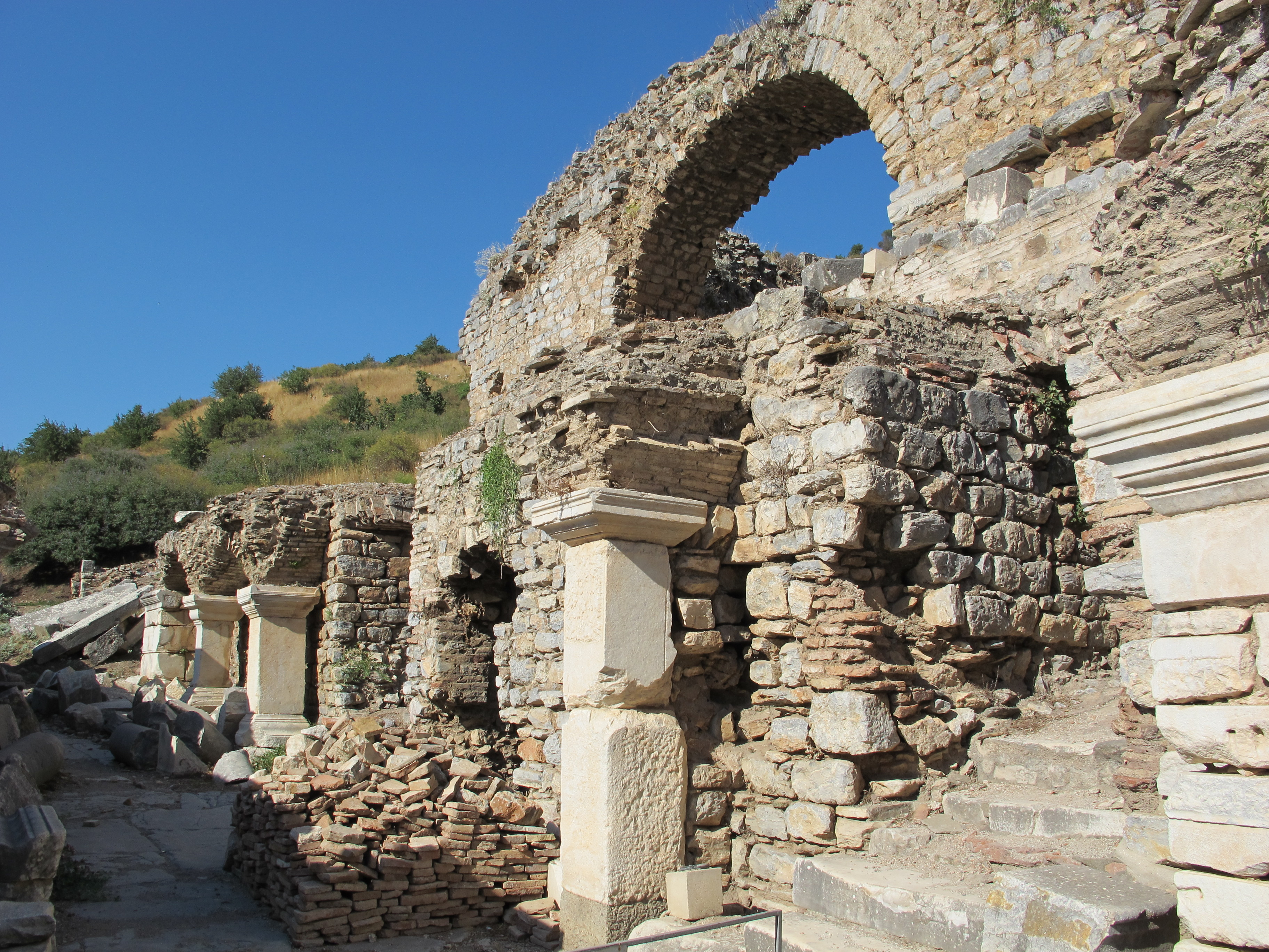 Efeso, tempio di adriano